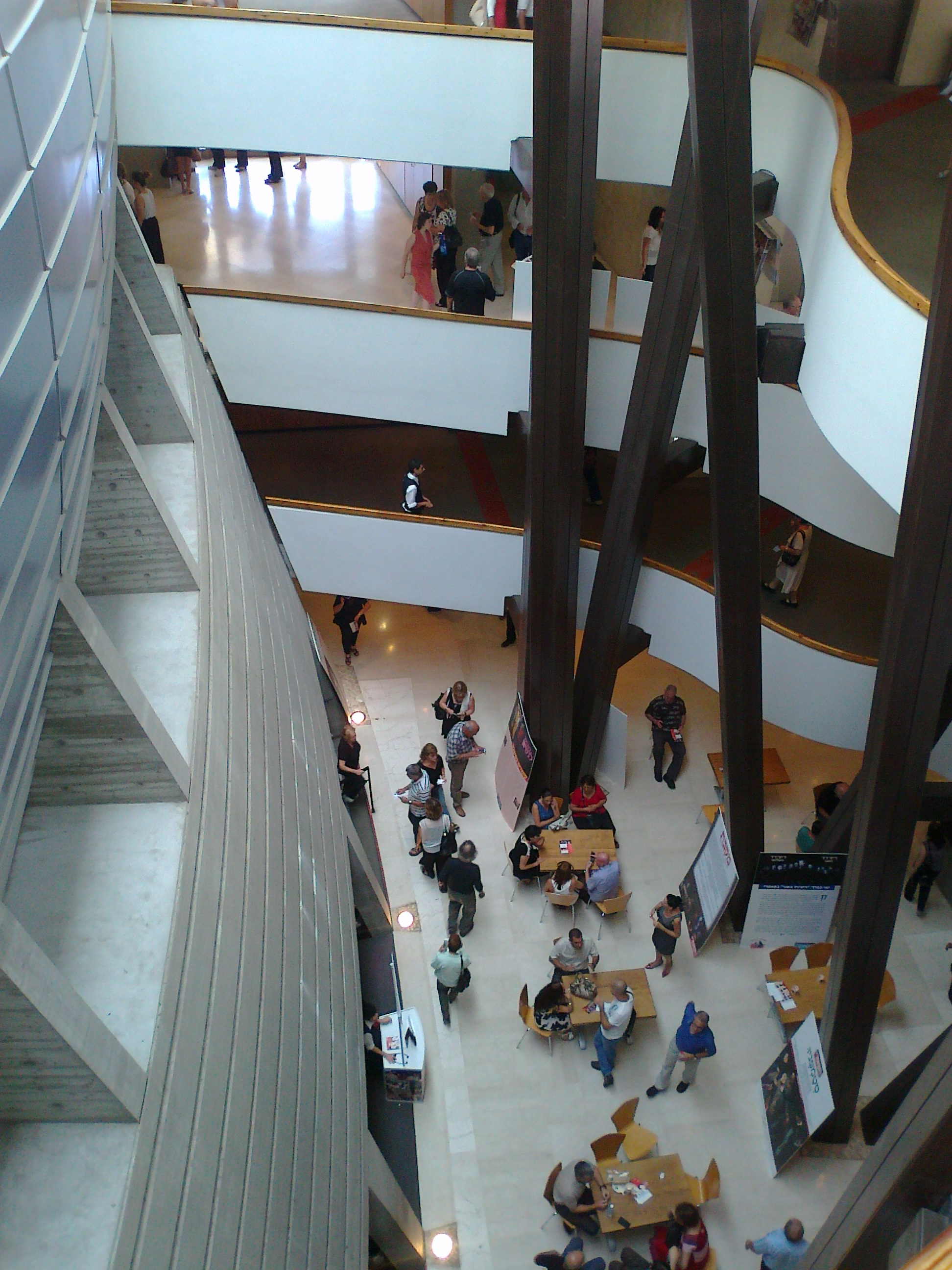 חלל פנימי של תאטרון הקאמרי שבתל אביב